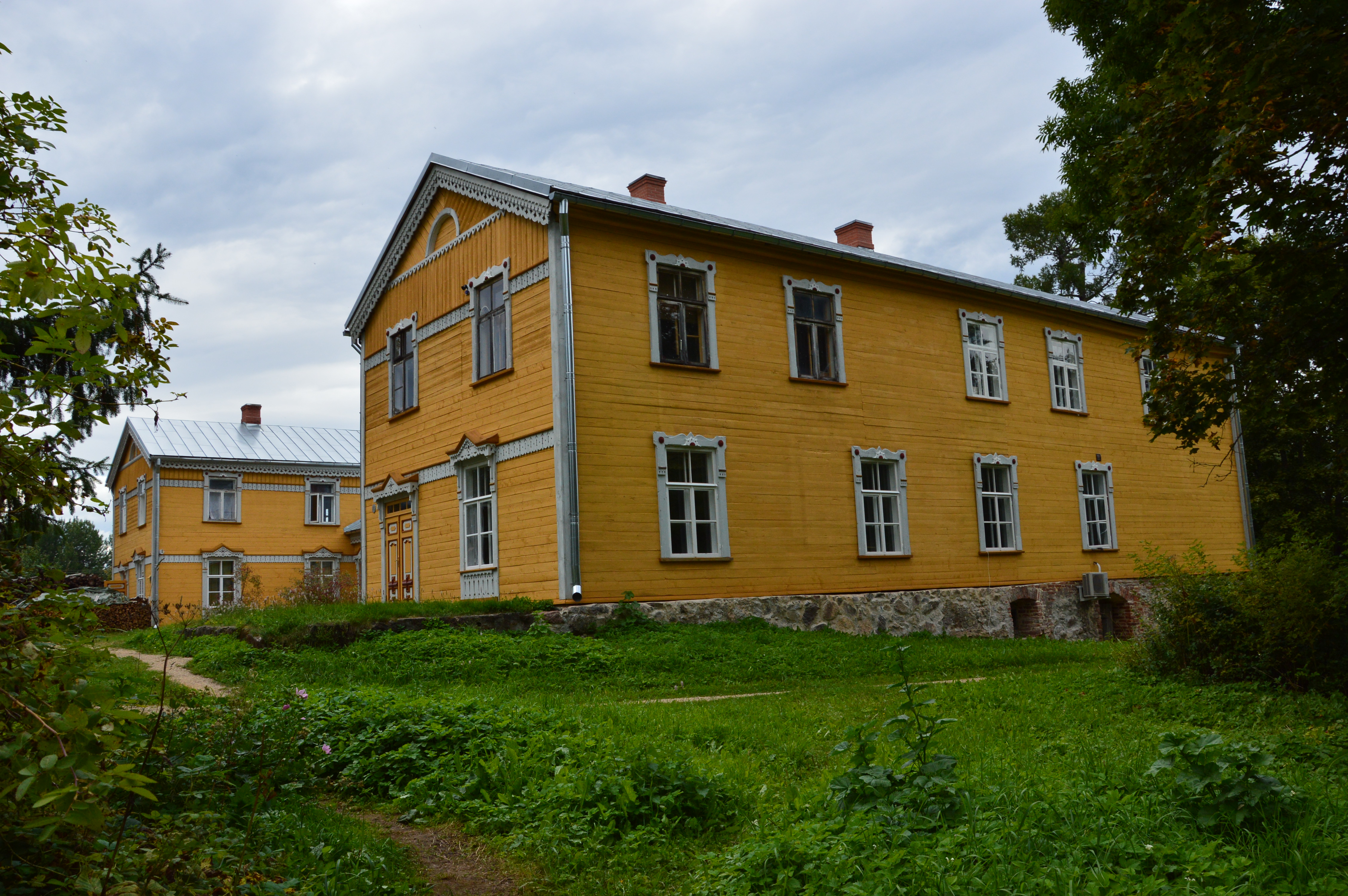 Sänna mõisa peahoone